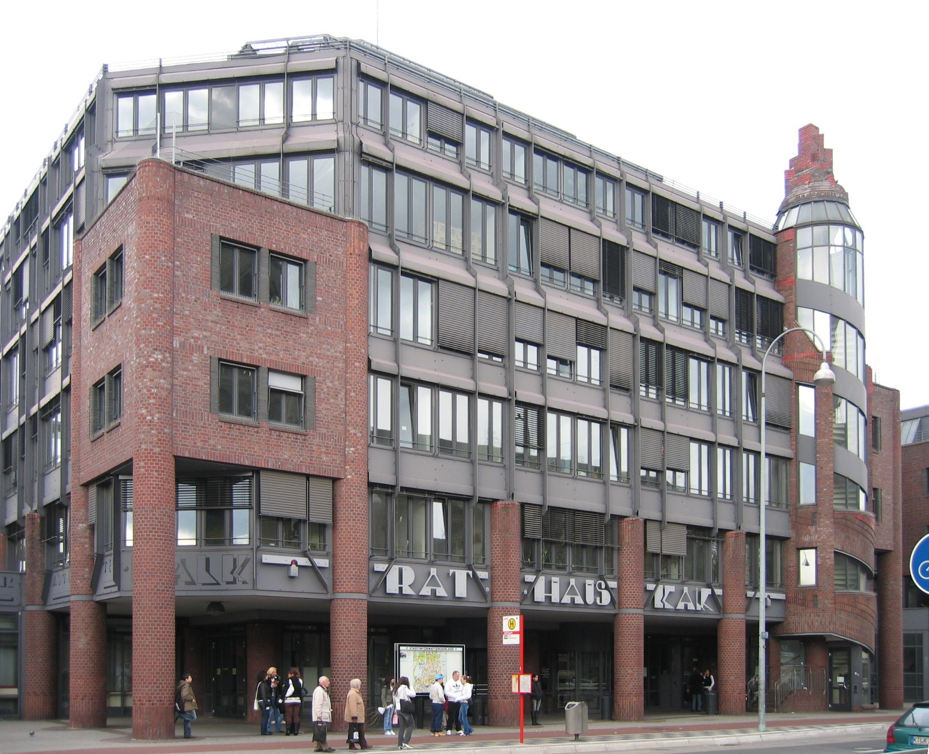 Rathaus Köln-Kalk